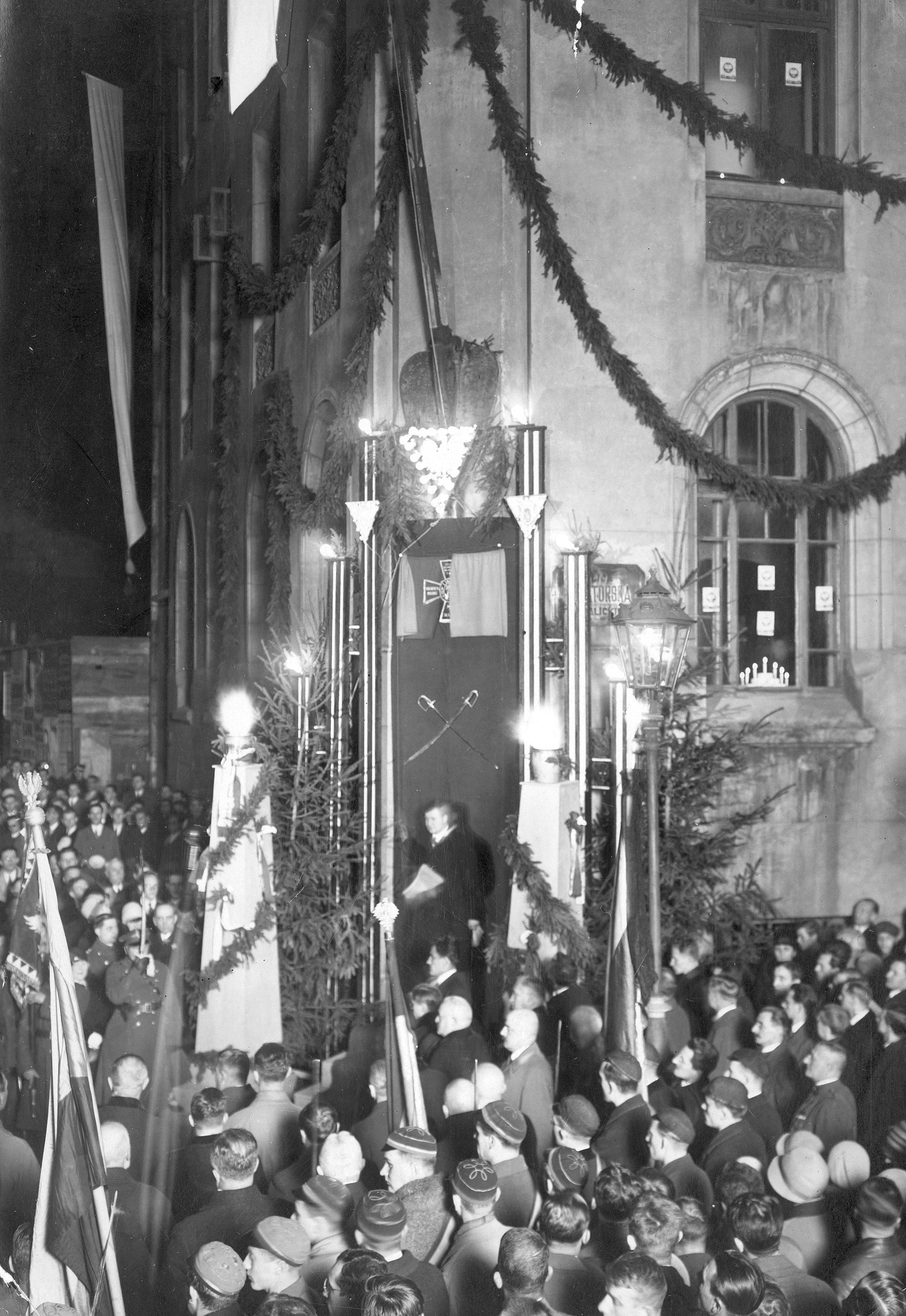 Uroczystość dekoracji Domu Akademickiego im. Adama Mickiewicza we Lwowie Krzyżem Obrony Lwowa. Dekoracji dokonuje przedstawiciel Kapituły Krzyża Obrony Lwowa rtm. dr Tadeusz Michał Nittman.